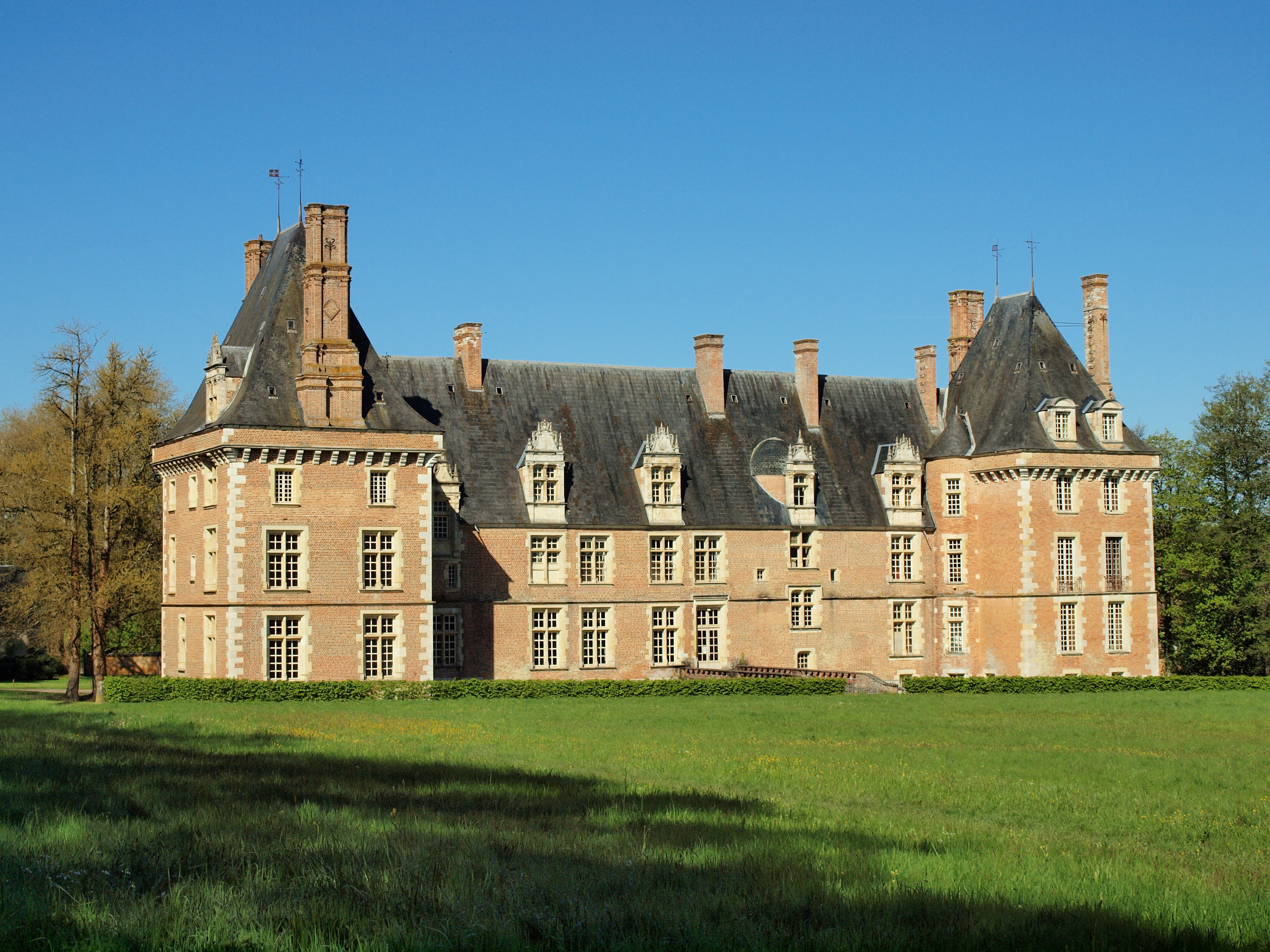 Château de Saint-Amand-en-Puisaye (Nièvre, France)